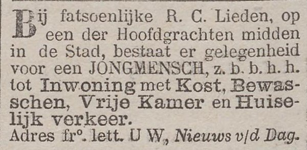 Advertentie voor een kamer te huur, met de afkorting b.b.h.h. (= "bezigheden buitenshuis hebbende"), dus overdag van de vloer, een belangrijke eigenschap voor een inwonende huurder, advertentie in Het nieuws van den dag : kleine courant. z.b.b.h.h. = "zijn bezigheden buitenshuis hebbende", 08-08-1881. R.C. is Rooms-katholiek, z.b.b.h.h. is "zijn bezigheden buitenshuis hebbende", fro is franco, lett. is letter, code voor een postvak bij de krant.